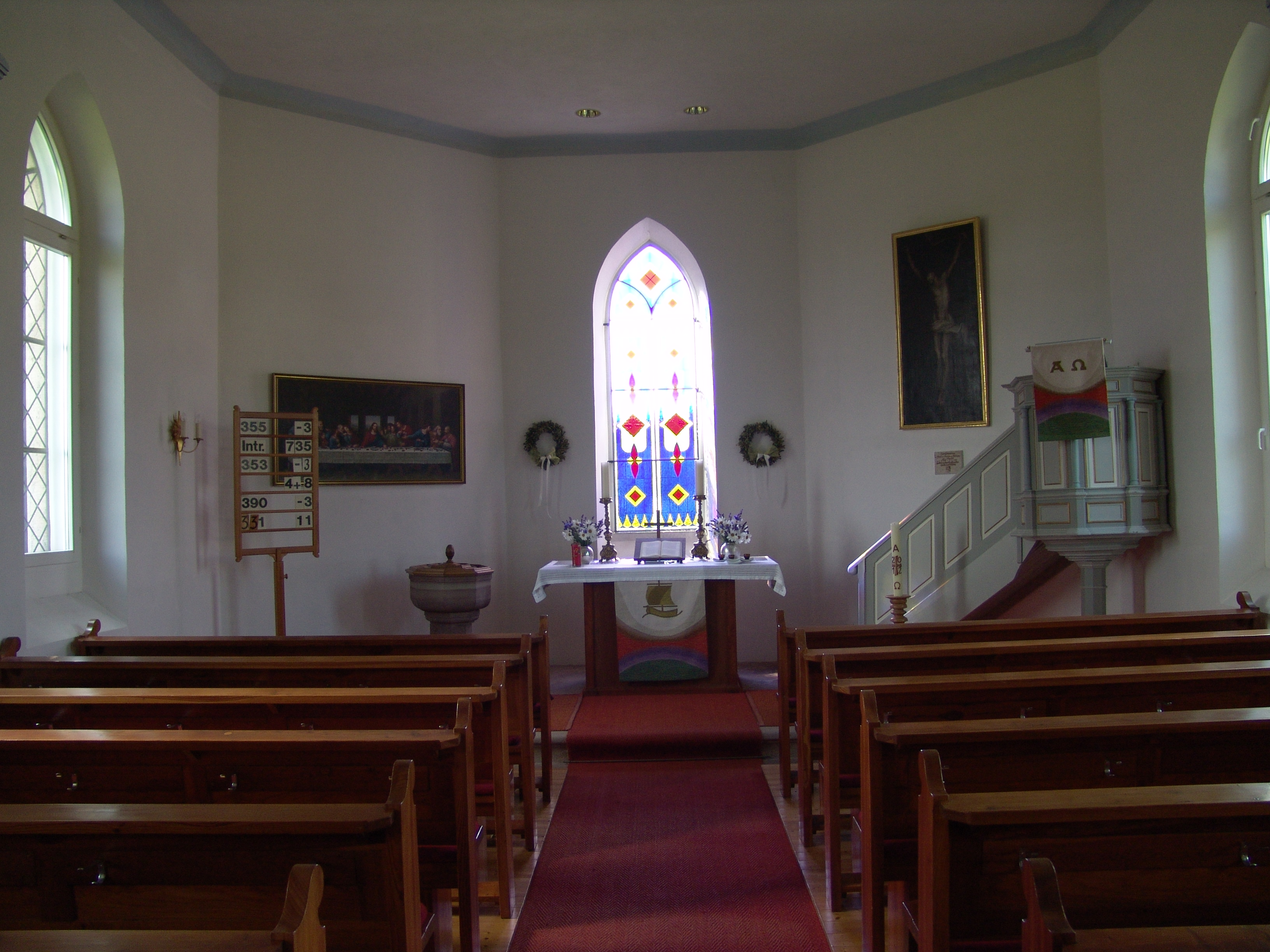 Auferstehungskapelle und Friedhof derer von Thüngen in Roßbach